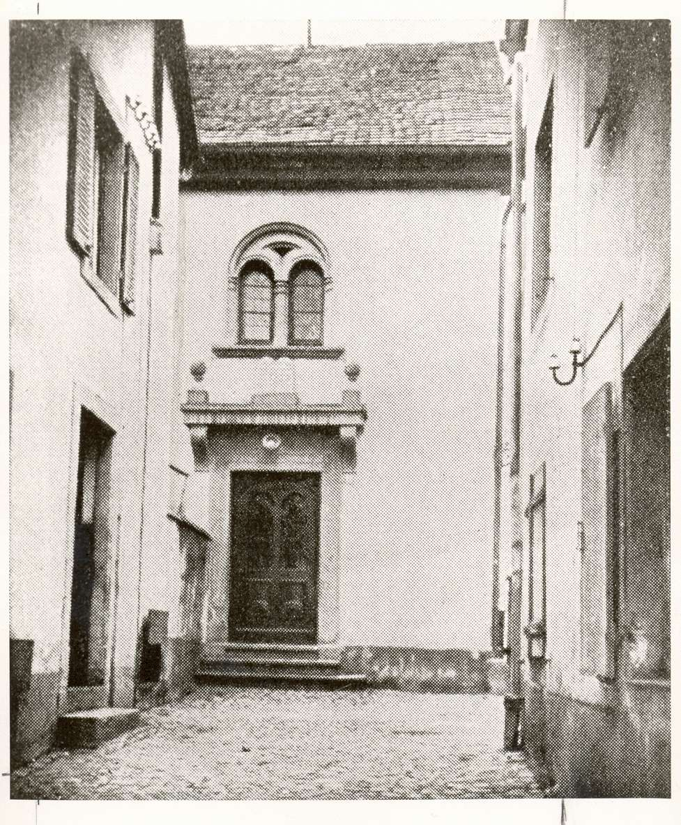 Alte Synagoge Lörrach Nutzungsbedingungen ausdrücklich auch für Wikipedia (siehe: [1]